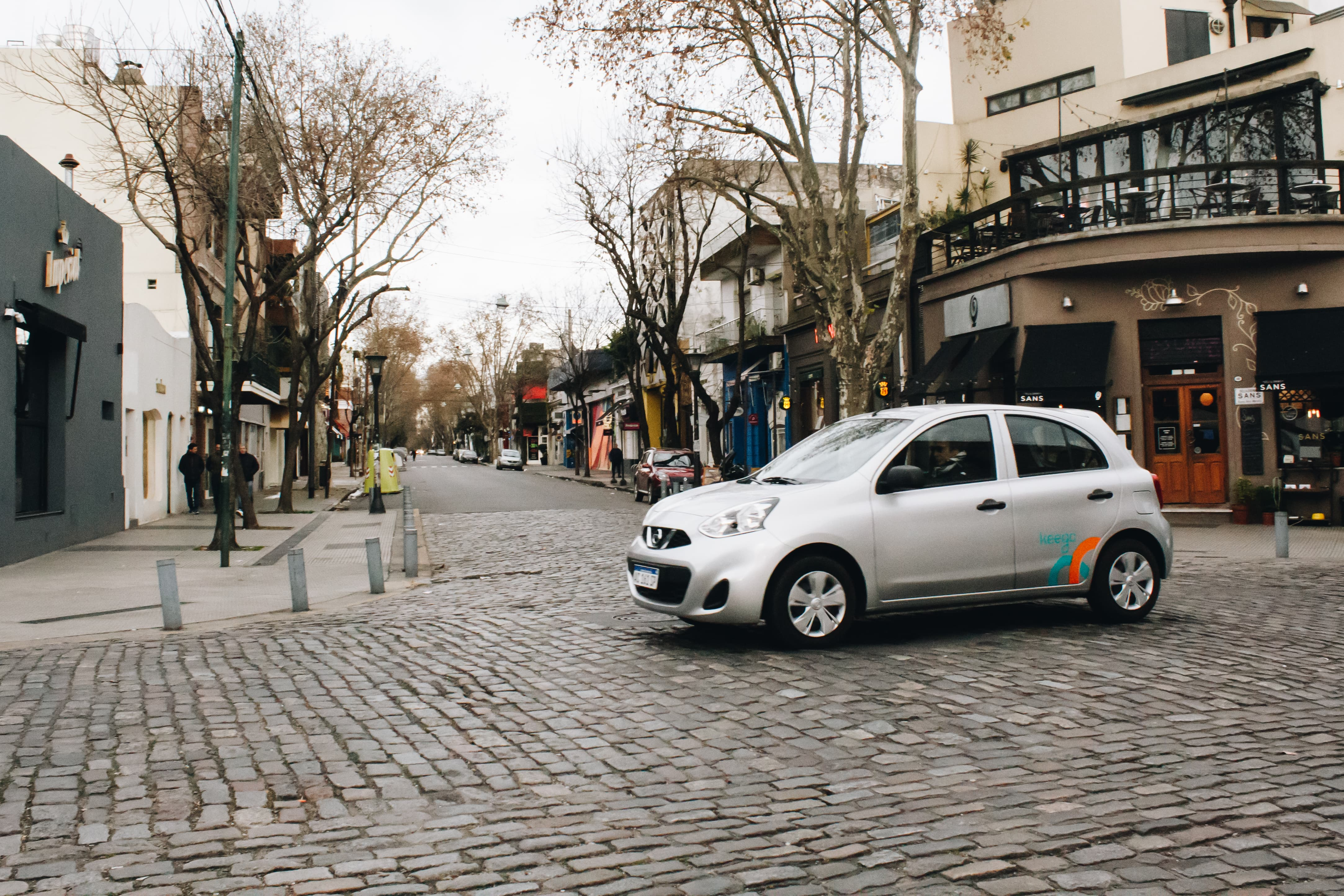 Carsharing MyKeego Car in Bs As, Argentina